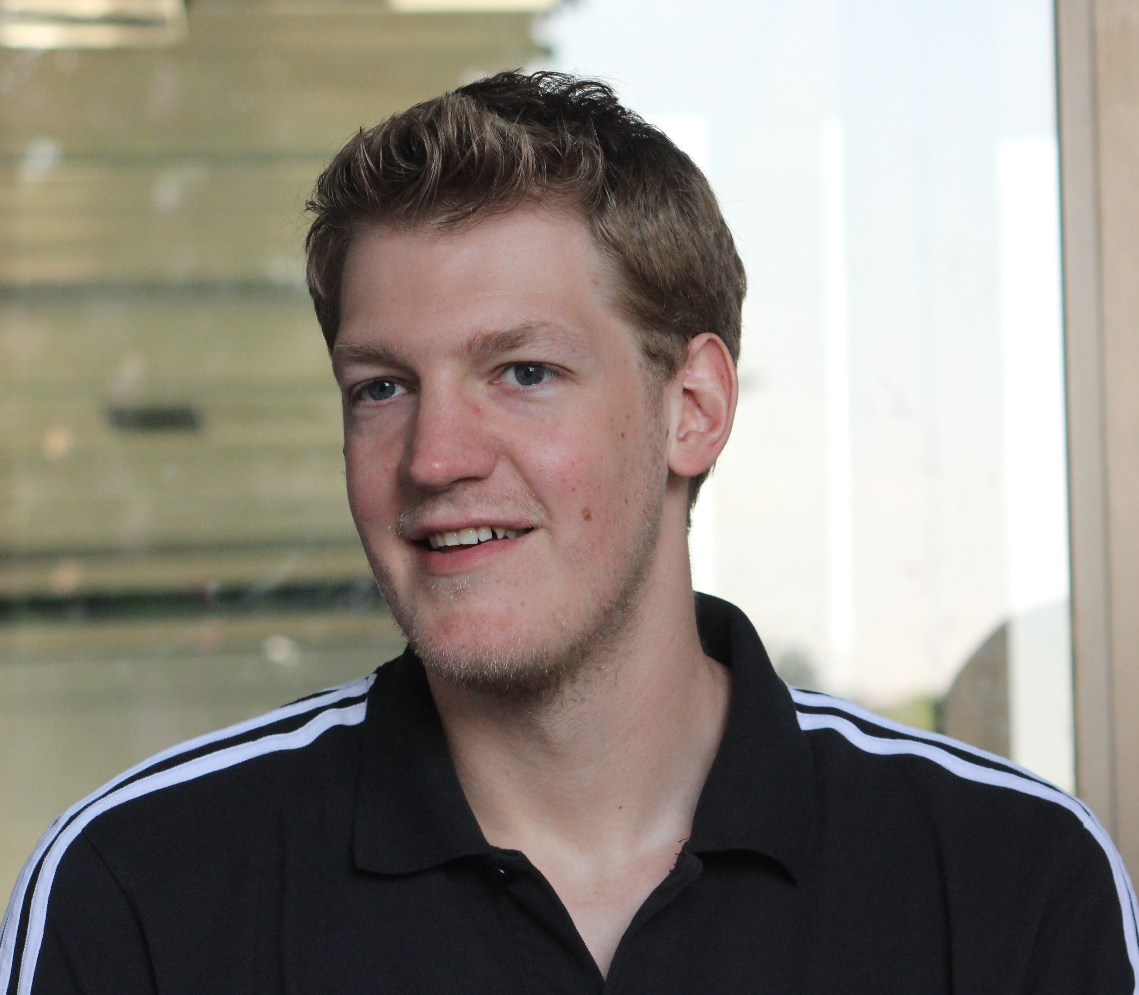 FC Bayern München (Basketball)Jan Jagla